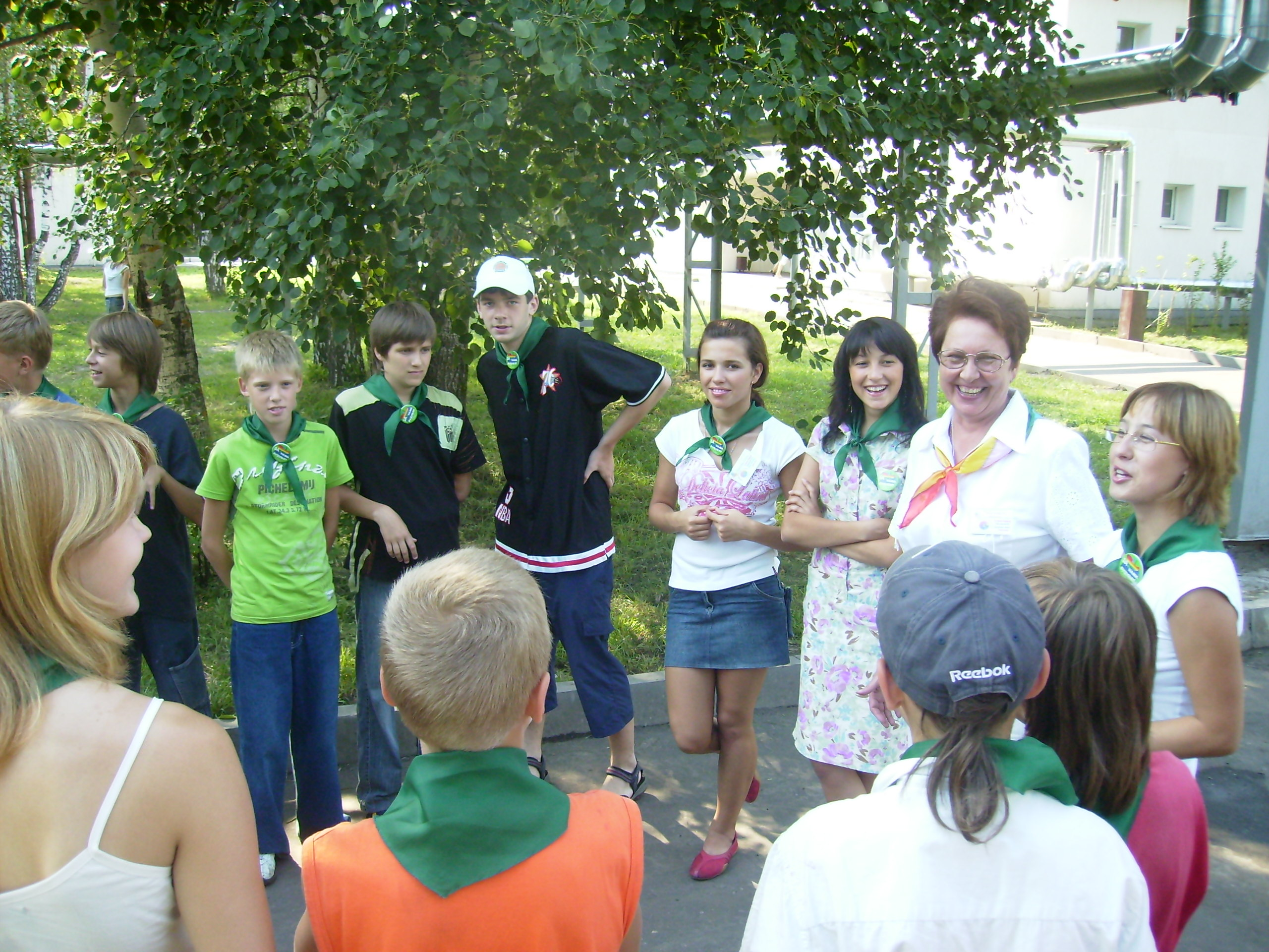 ДОЛ "Звездочка". проект "Ребячья губерния "Радуга"